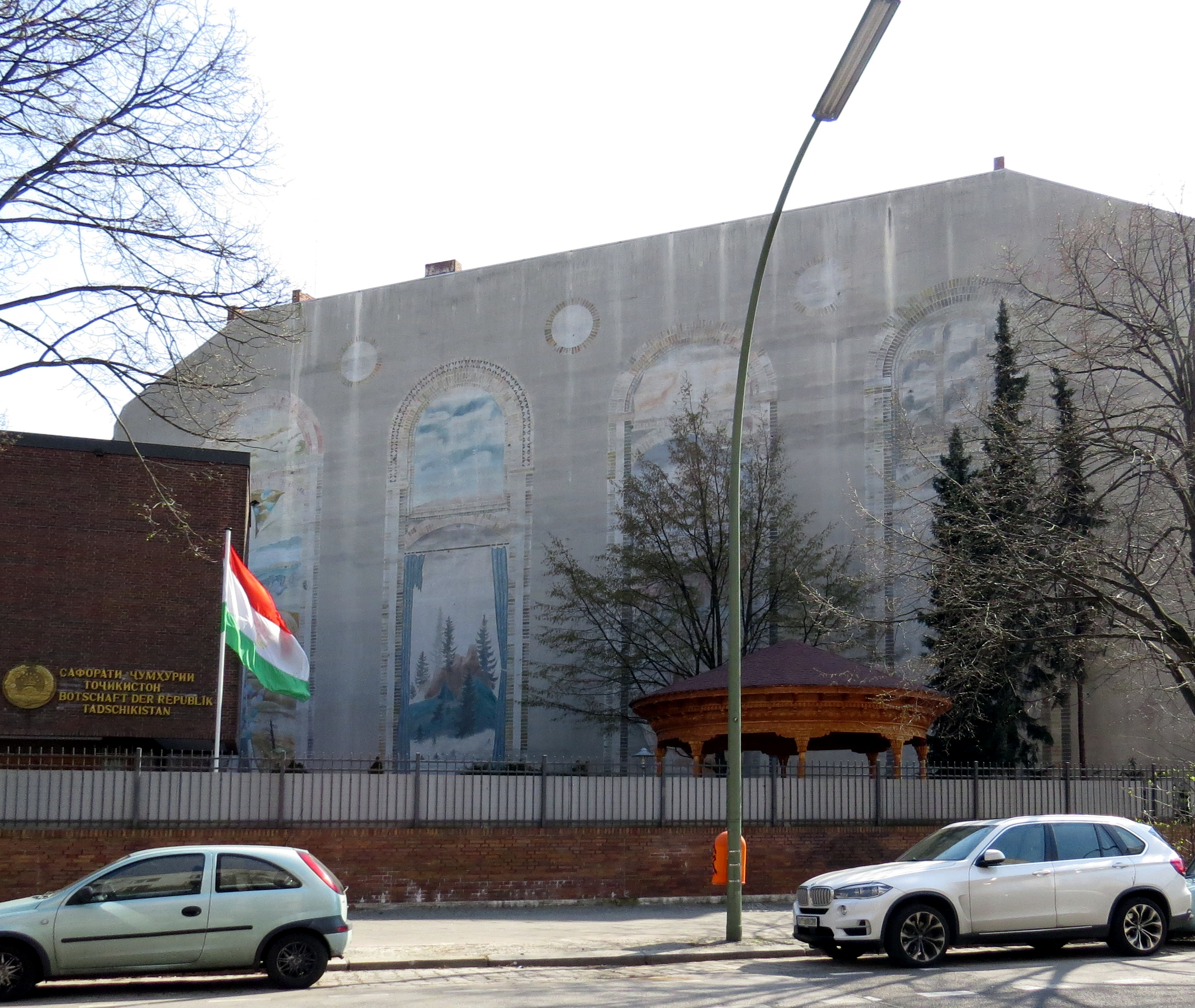 Botschaft der Republik Tadschikistan